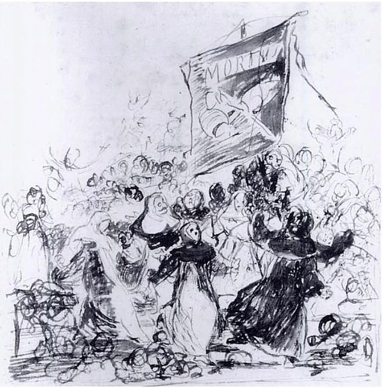 Francisco de Goya: El entierro de la sardina (Burial of the sardine), pen and sepia ink, c. 1816, Museo del Prado, Madrid